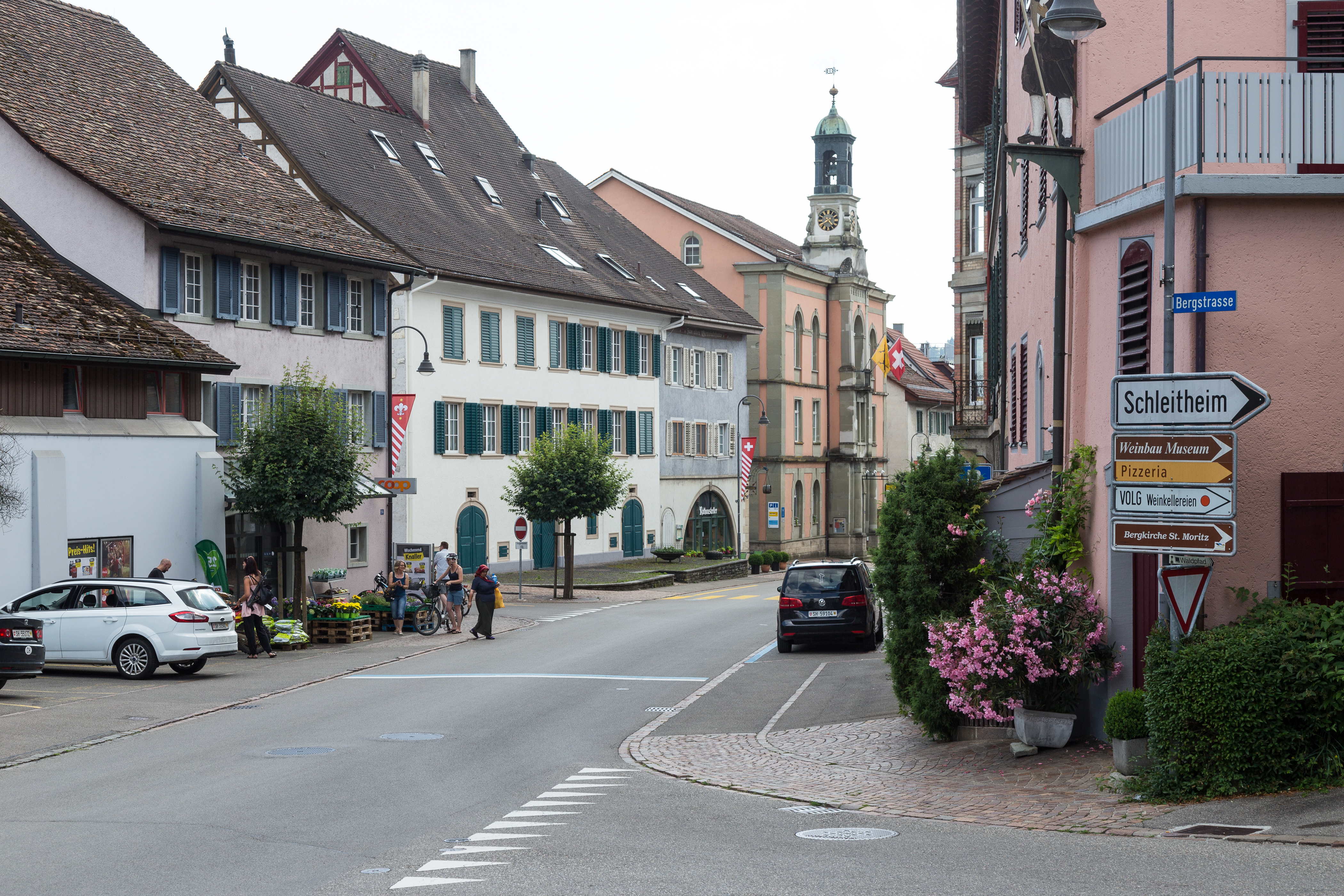 Hauptstrasse mit Gemeindehaus in Hallau SH